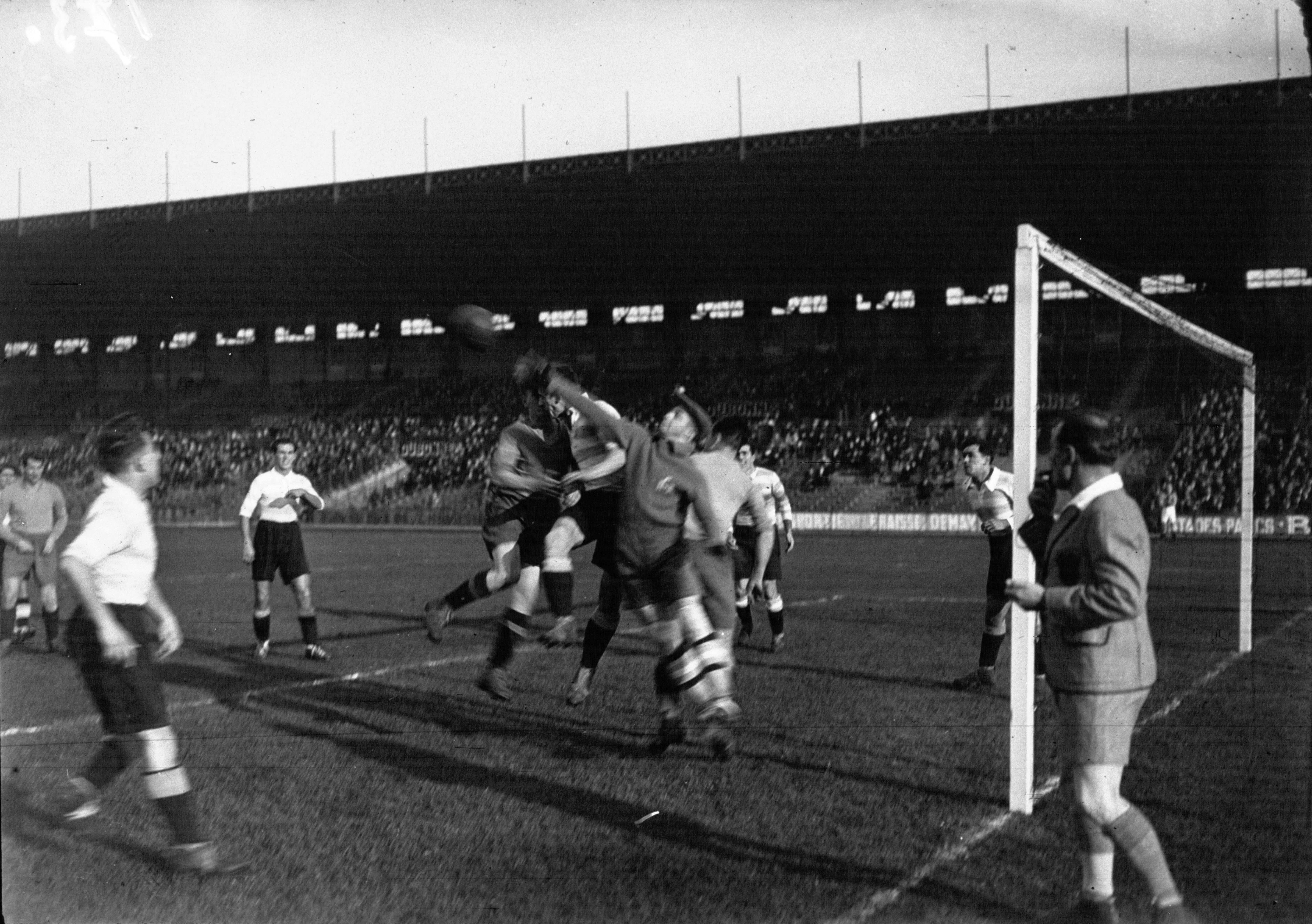 Match de football amical entre le First Vienna et le Racing Club de France (1932).